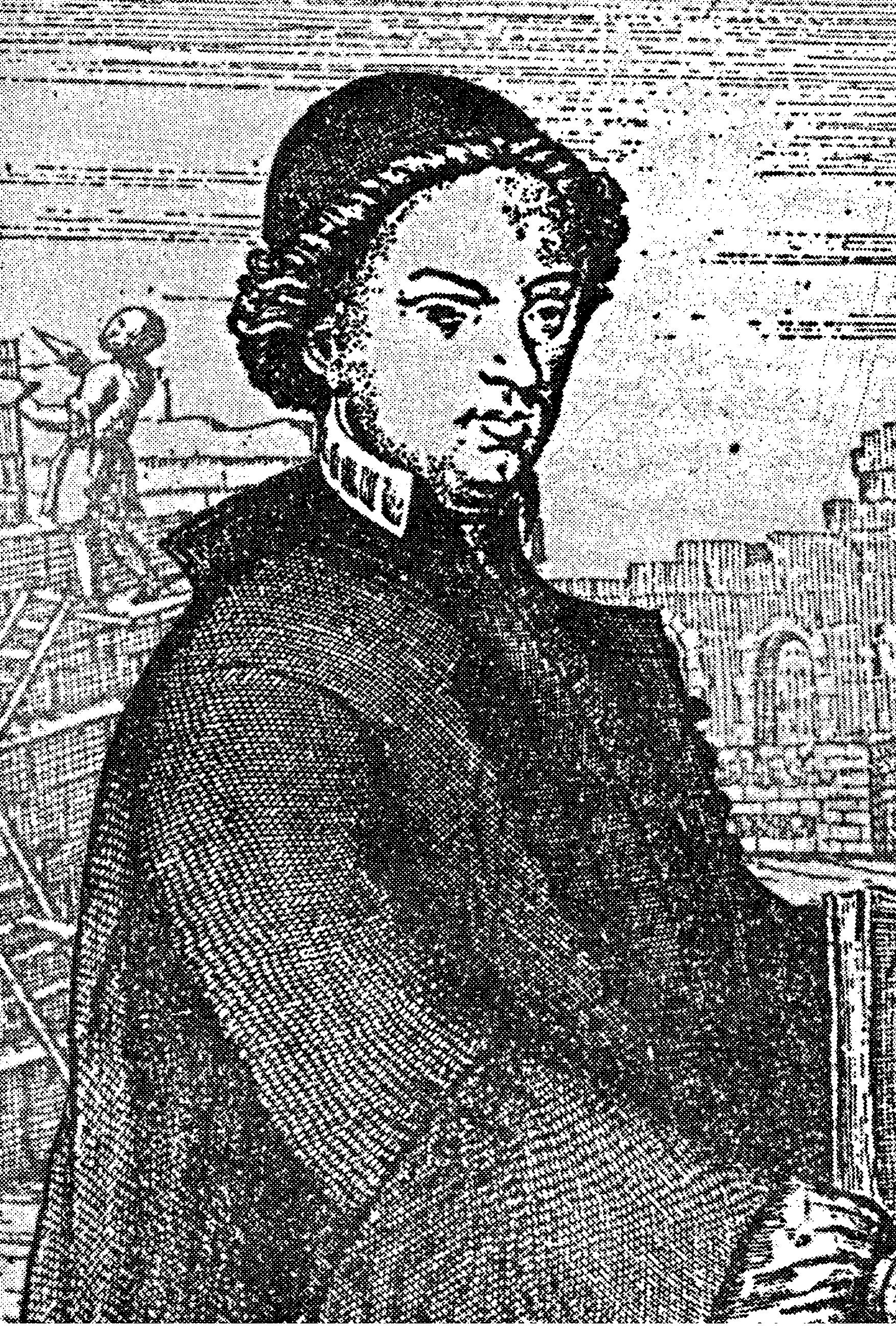 Giovanni Biagio Amico (Trapani, 3 febbraio 1684 – Trapani, 3 settembre 1754) è stato un architetto, teologo, sacerdote italiano. Presi gli ordini sacri continuò la carriera ecclesiastica fino a diventare vicario generale della diocesi di Trapani. Da autodidatta studiò architettura, matematica e disegno tecnico, fu nominato ingegnere del regno di Palermo. Ebbe come allievi: Andrea Gigante, Giuseppe Venanzio Marvuglia e Nicolò Palma (nipote di Andrea Palma).